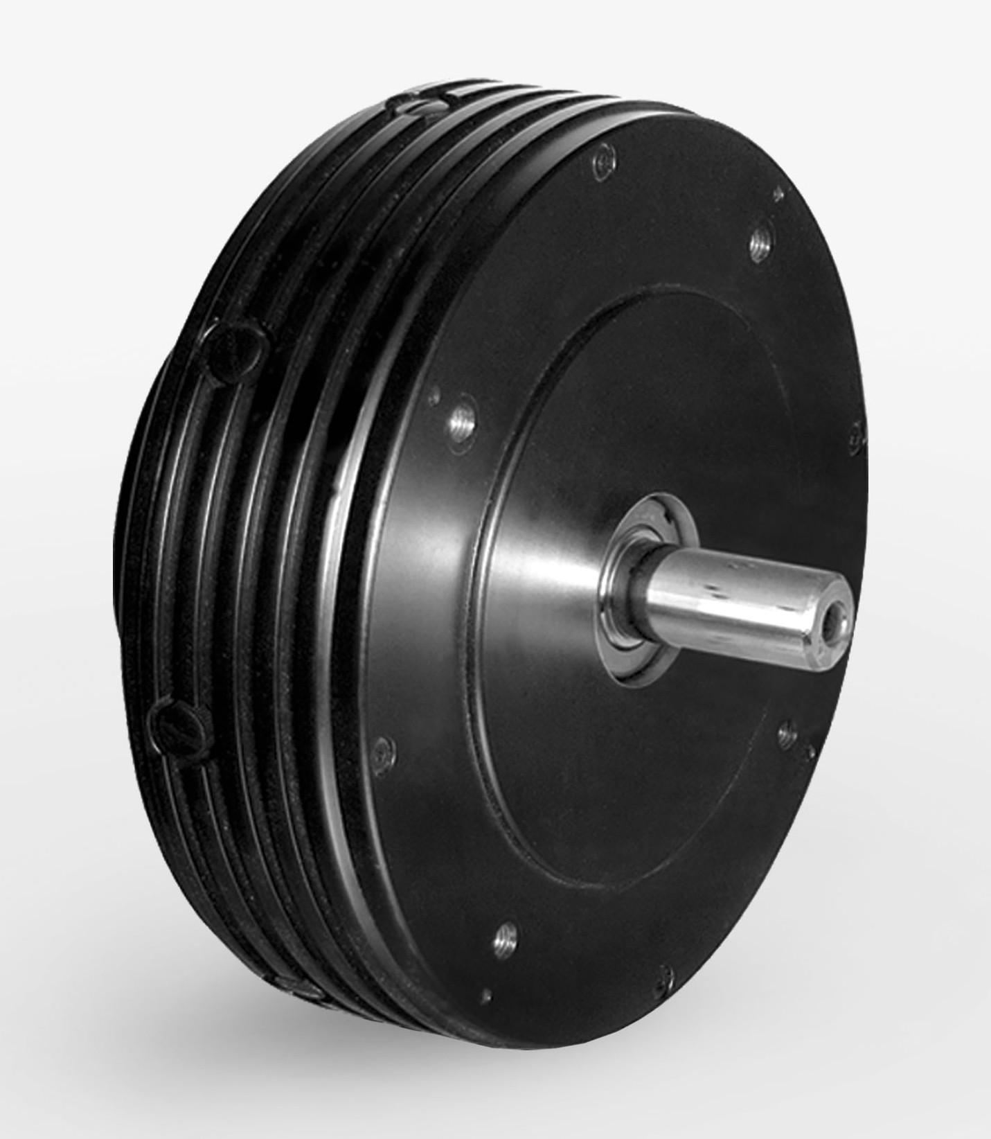 Scheibenläufermotoren zeichnen sich in erster Linie durch ihre besonders platzsparende, flache Bauform aus.